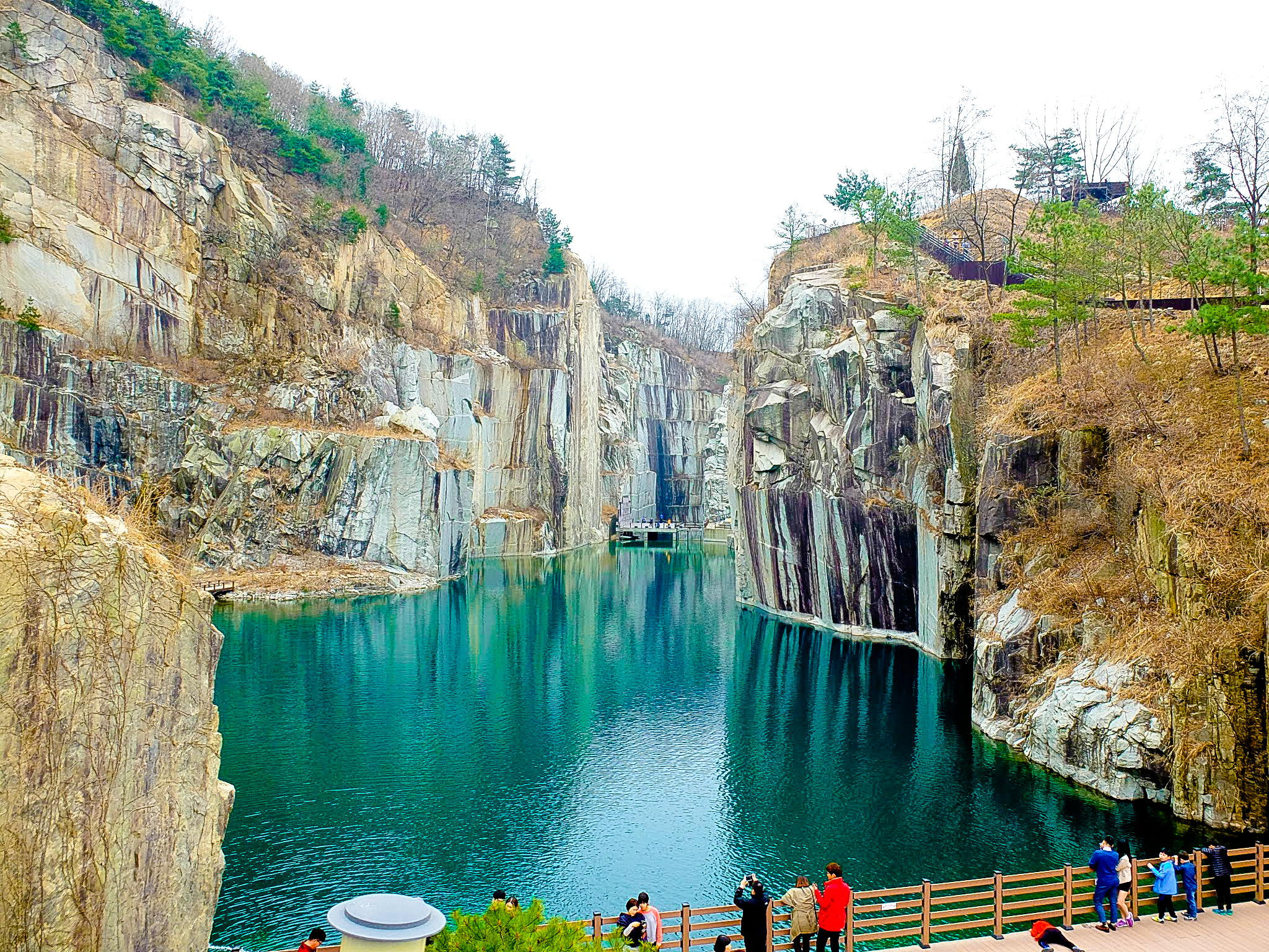 Pocheon Art Valley